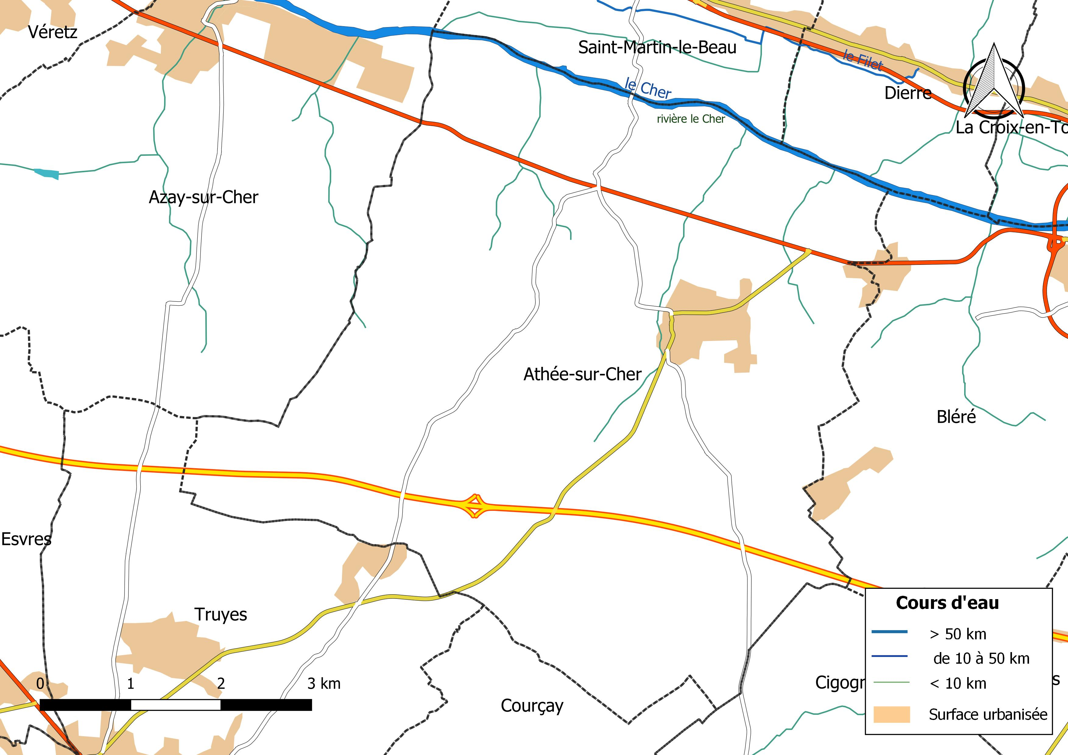 Carte du réseau hydrographique de la commune de Athée-sur-Cher (France).